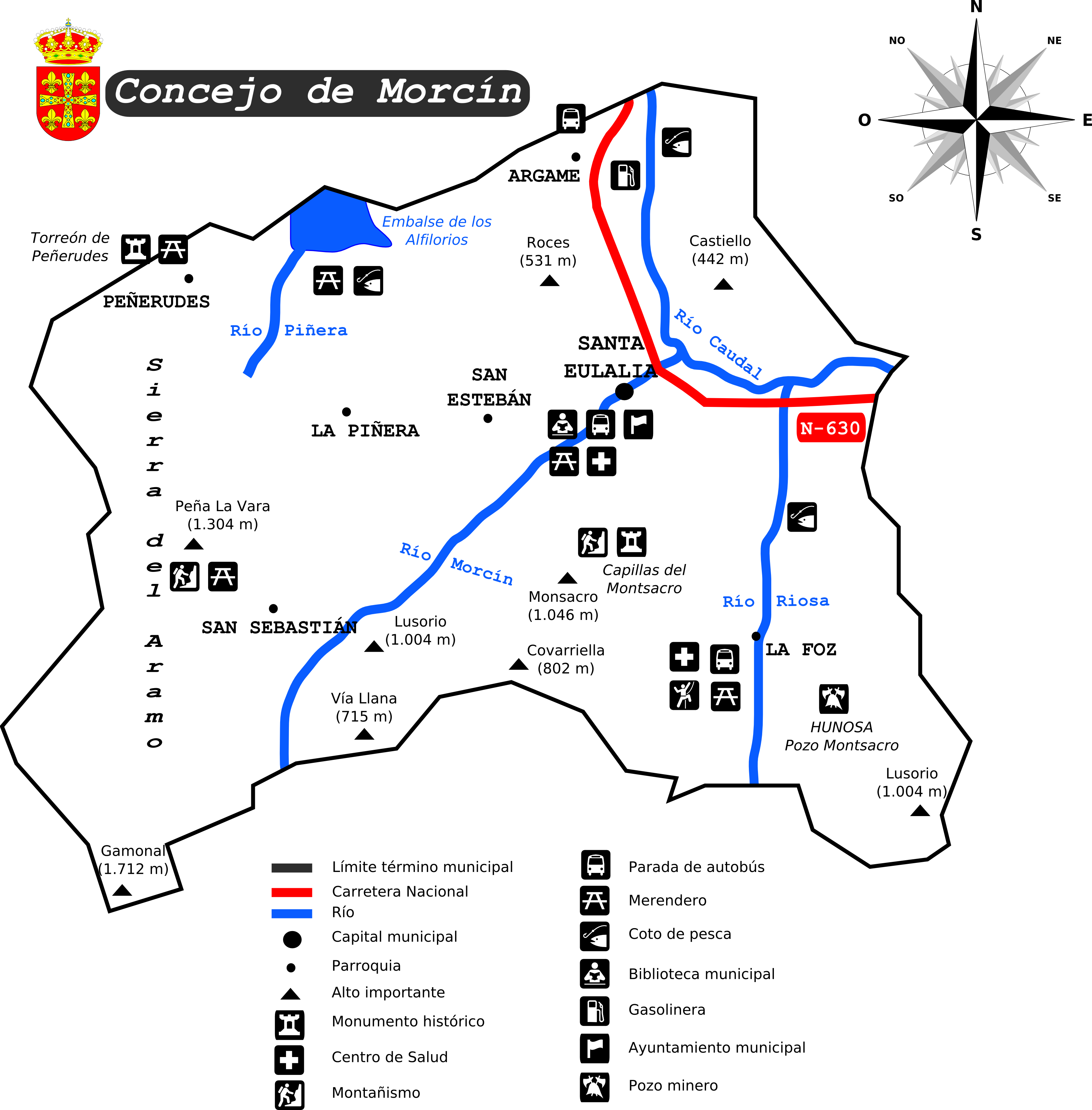 Mapa resumido del concejo de Morcín.